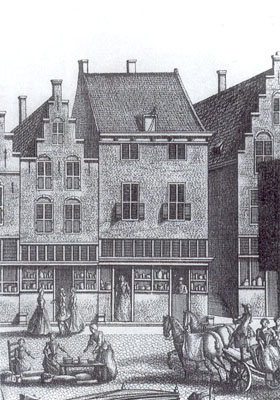 Gesigt van de Groote Markt tot Delft siende naar het Stadthuys, Oude en Nieuwe Kerk [detail: huis Mechelen]